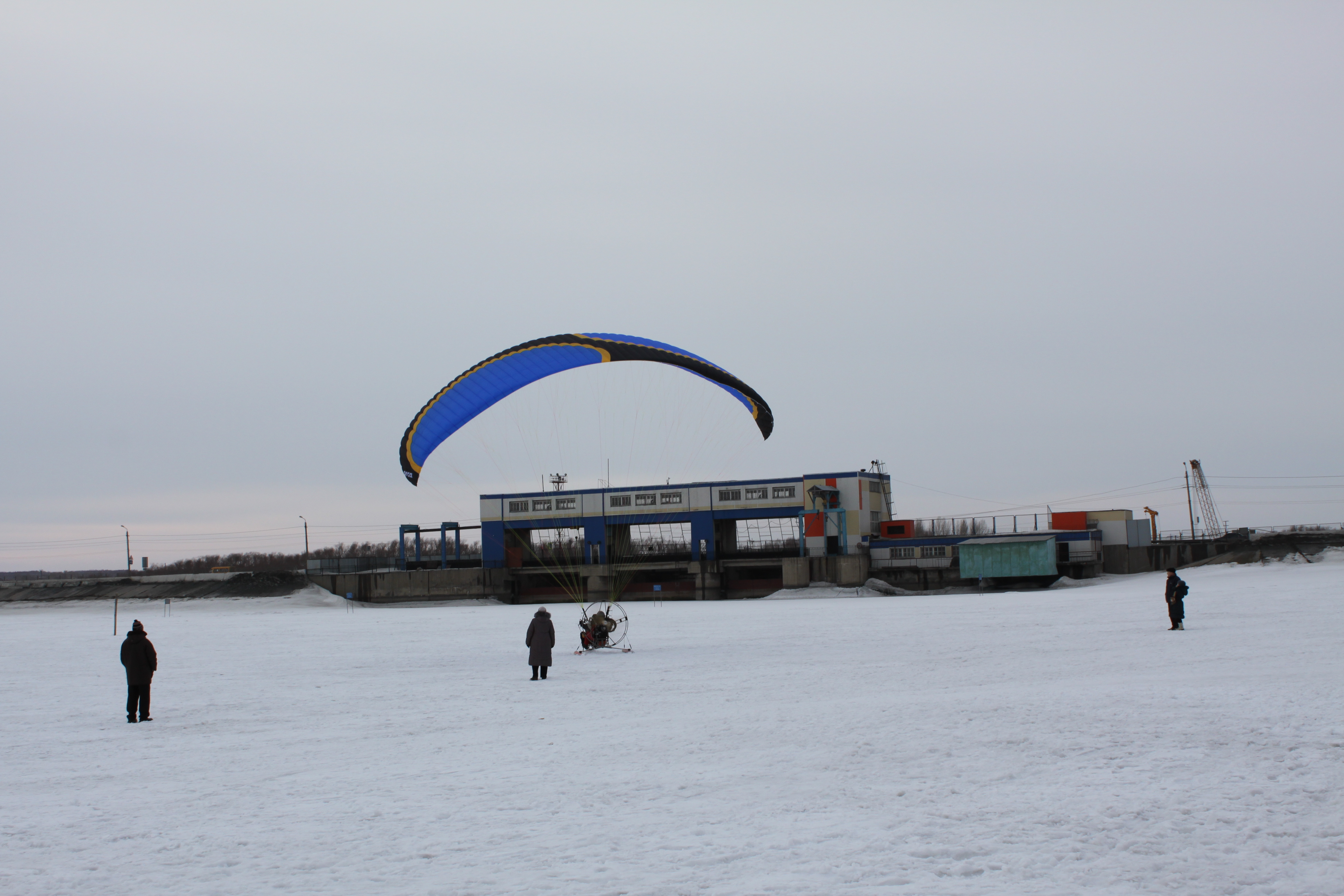 Шершнёвское водохранилище. Платина. Летательный аппарат.